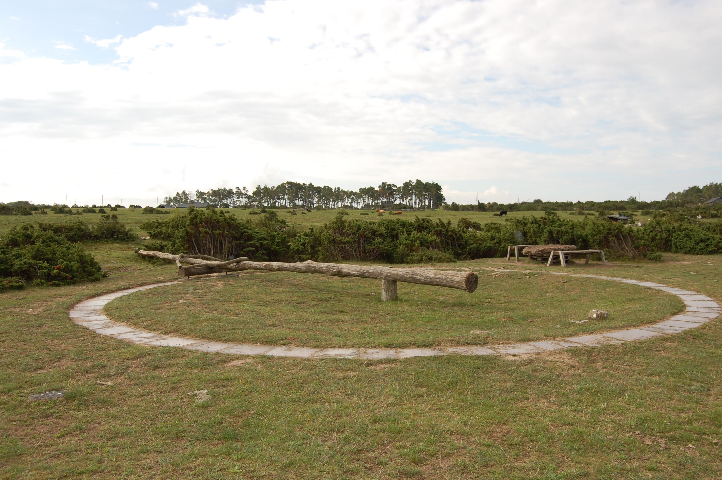 Jordhamn, Öland, Göpel an dem früher mit Ochsenkraft am Boden im Kreis liegende Steinplatten geschliffen wurden